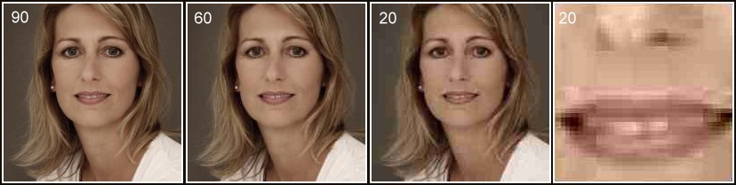 JPEG-Kompressionsartefakte